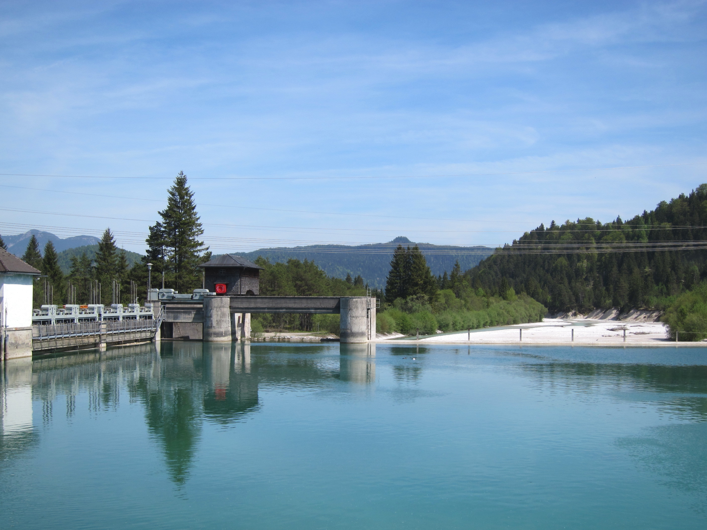 Stauwehr des Isar-Stausees bei Krün, links der Kanal-Einlauf, in der Mitte ein bewegliches Schütz, anschließend eine Überlauframpe, dahinter die Isar mit dem festgelegten Restwasser